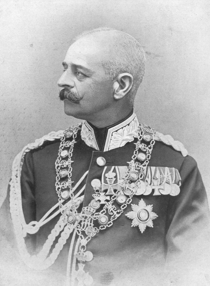 Großherzog August II. von Oldenburg (1852-1931).